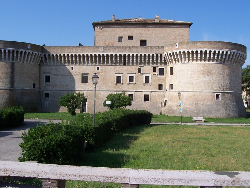 Senigallia - Rocca Della Rovere